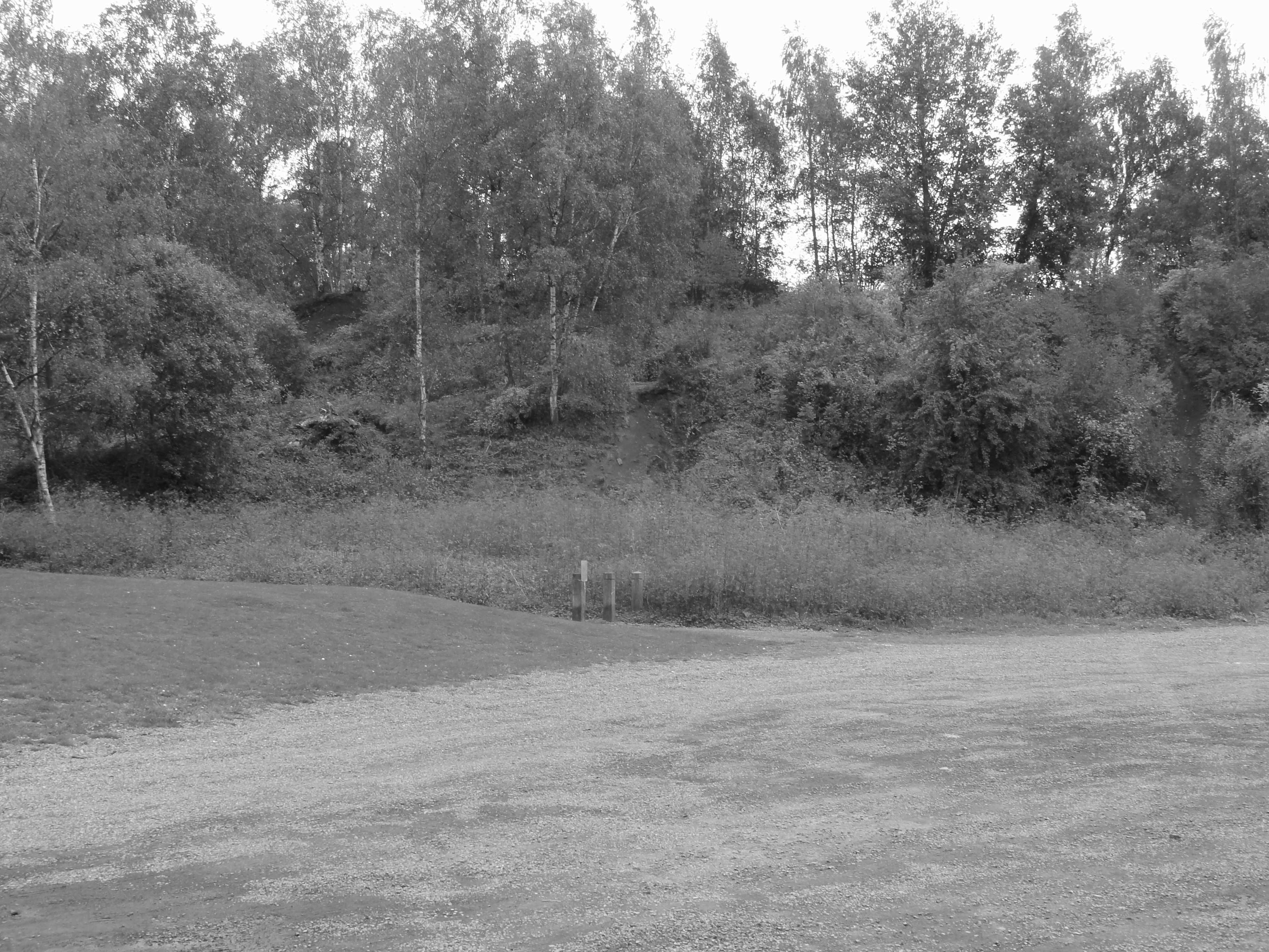 Terril n° 70 dit 3 - 4 de Meurchin Est chemin des îles, fosse n° 3 - 4 de la Compagnie des mines de Meurchin, Billy-Berclau et Wingles, Pas-de-Calais, Nord-Pas-de-Calais, France.